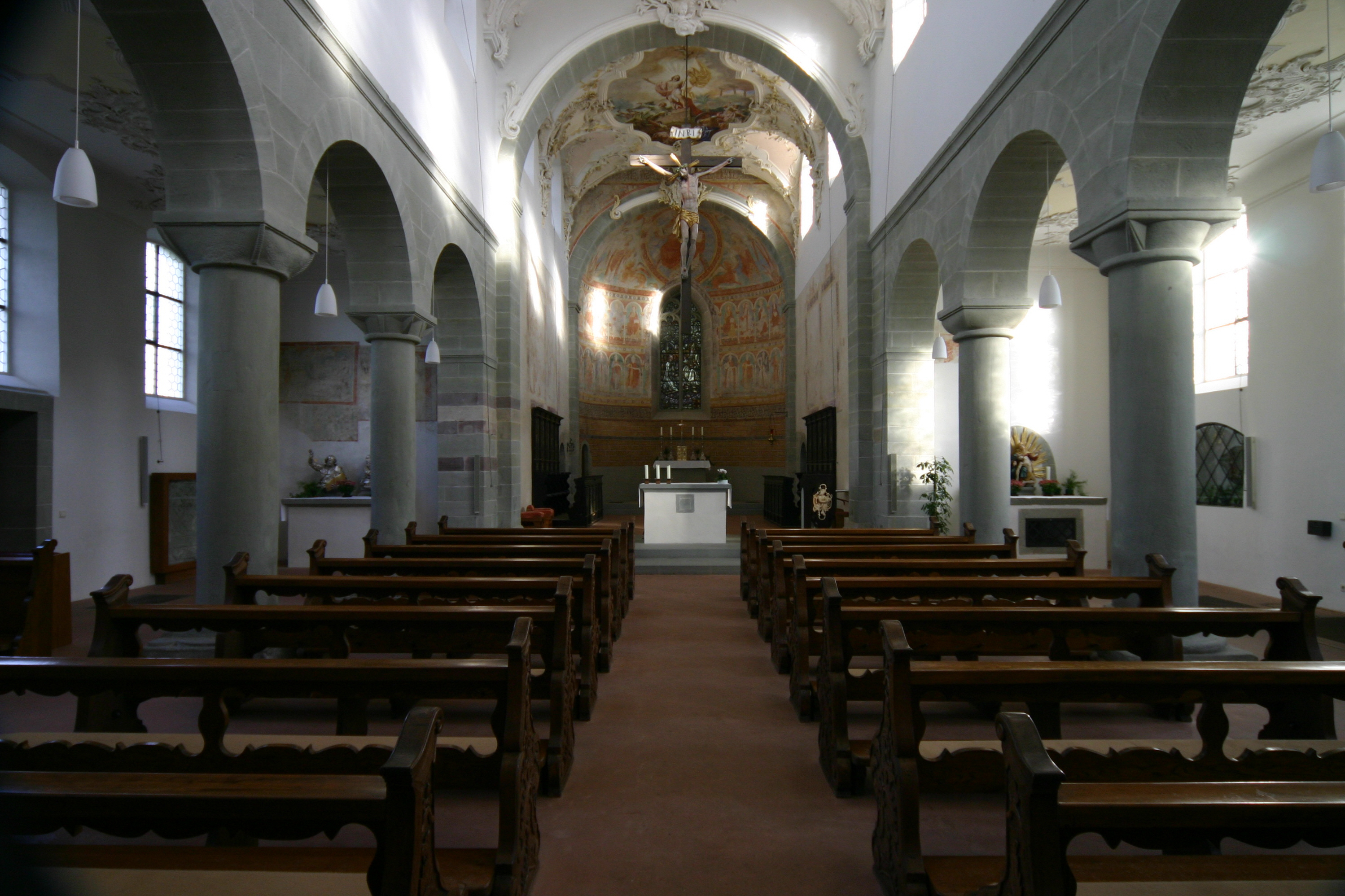 St. Peter und Paul, Reichenau-Niederzell